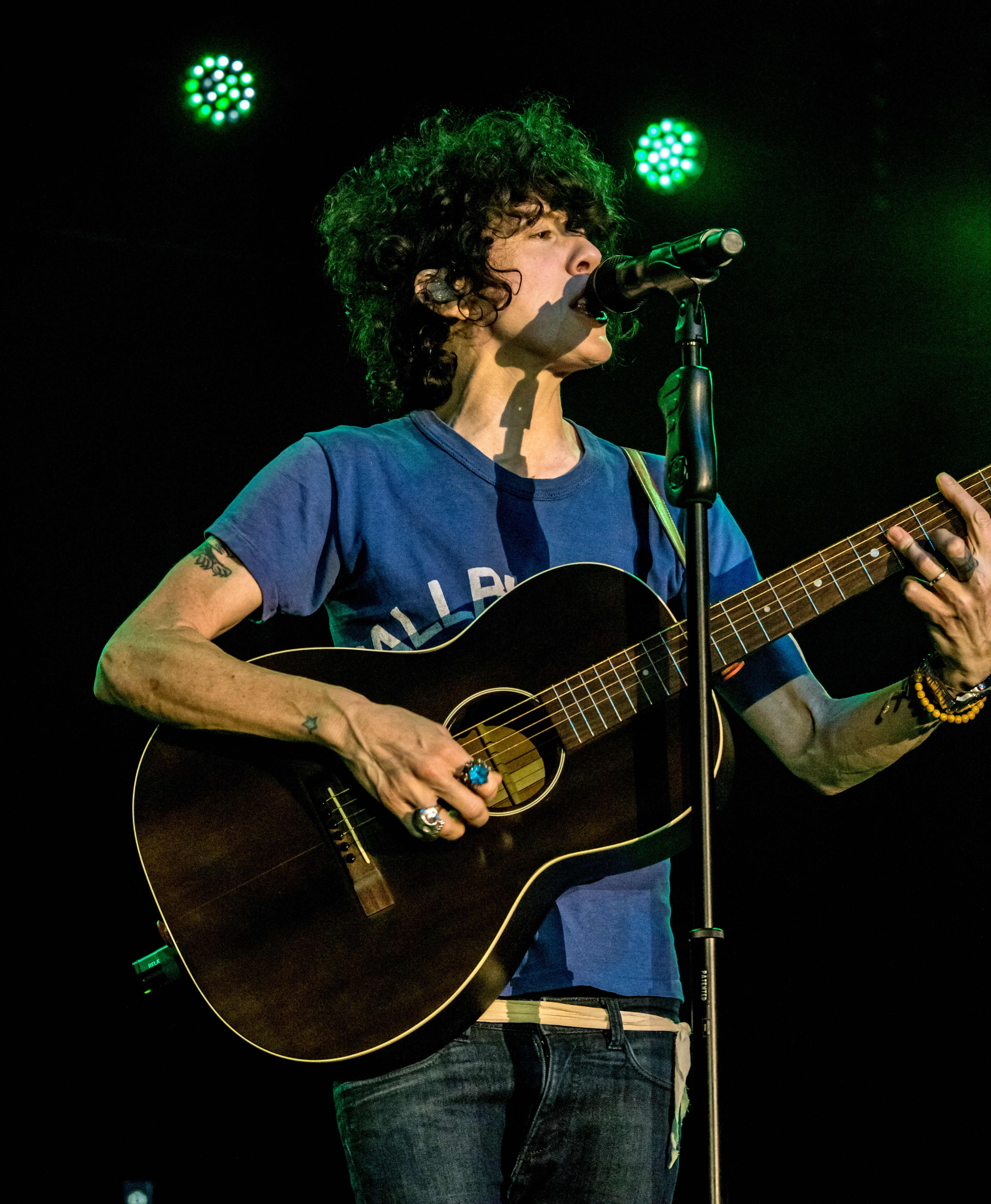 Bilder vom Zelt Musik Festival 2018 in Freiburg im Breisgau LP am 28.07.2018 im Zirkuszelt